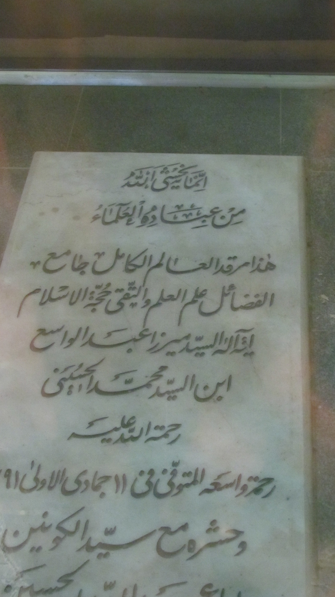 سنگ قبر ایت الله میرزا عبدالواسع مجتهدی زنجانی